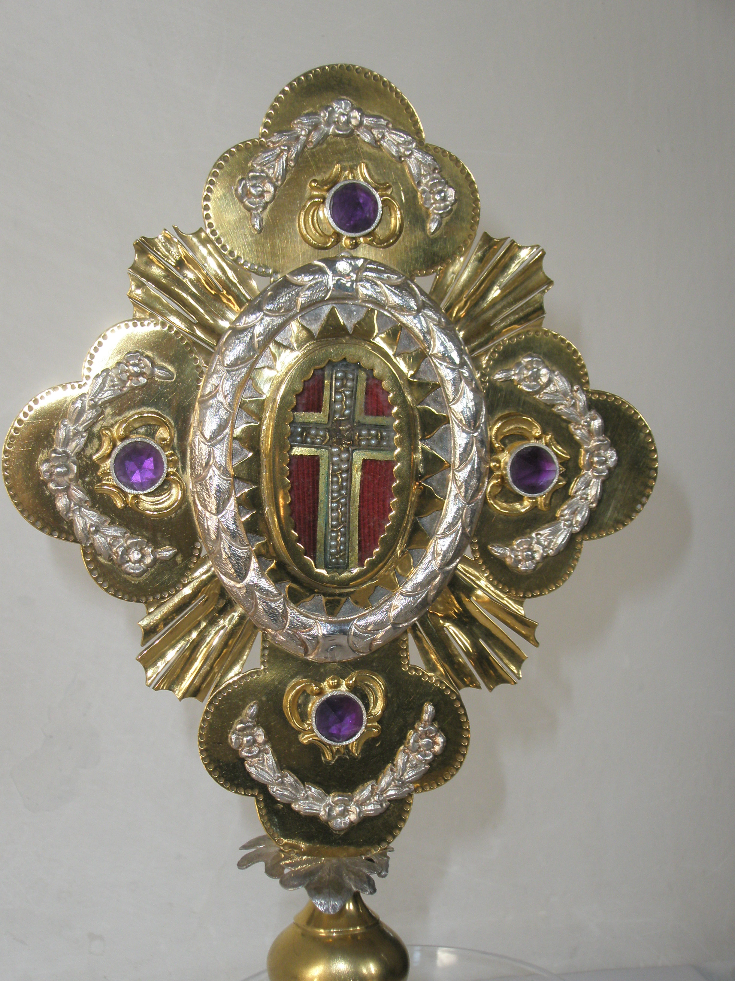 Das Wetterkreuz mit der Kreuzesreliquie aus der Schwendier Pfarrkirche.